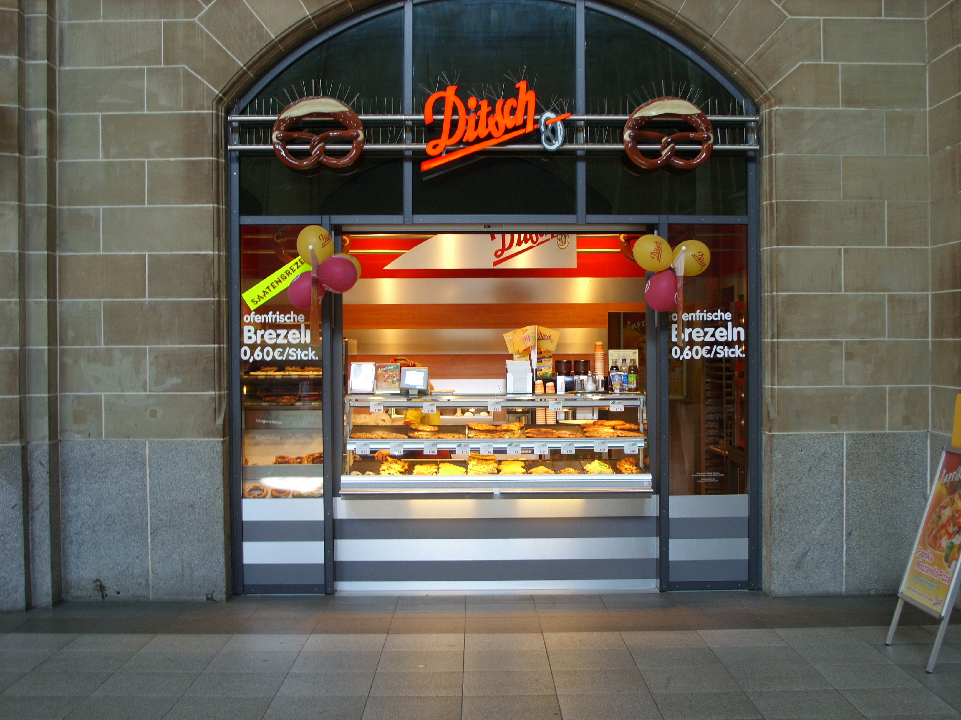 Ditsch-Bäckerei im Wiesbadener Hauptbahnhof